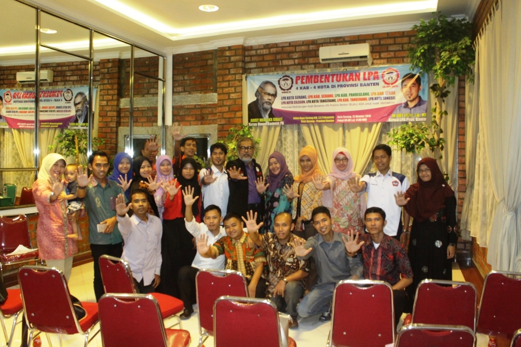 LPA Banten bersama para pemerhati anak di provinsi Banten membentuk LPA di tingkat Kab/Kota